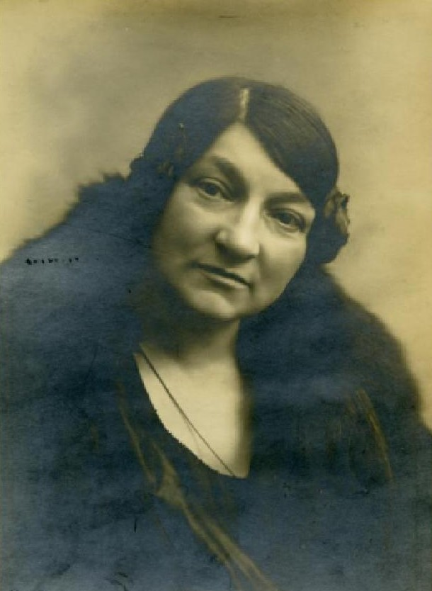 Abigail Horáková (1871-1926), česká spisovatelka, prozaička, dramatička, herečka a recitátorka